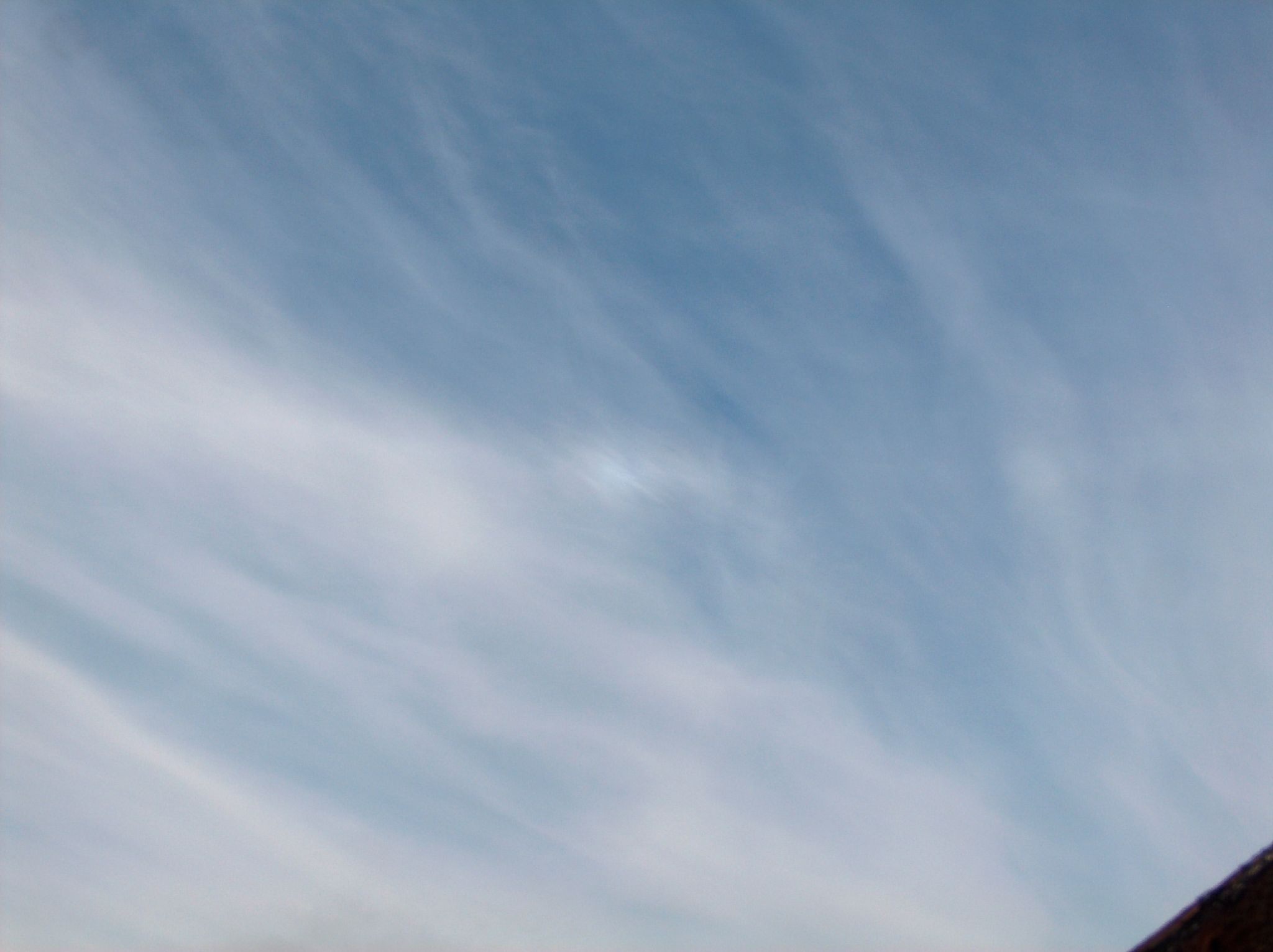 Faint 120 degree parhelion on parhelic circle.